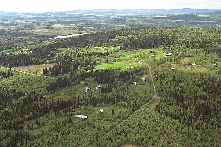 Motiv: Söderby och Bjurträsk Nyckelord: Flygbilder, Riksintressen Kategori: SkogslandskapSöderby och Bjurträsk